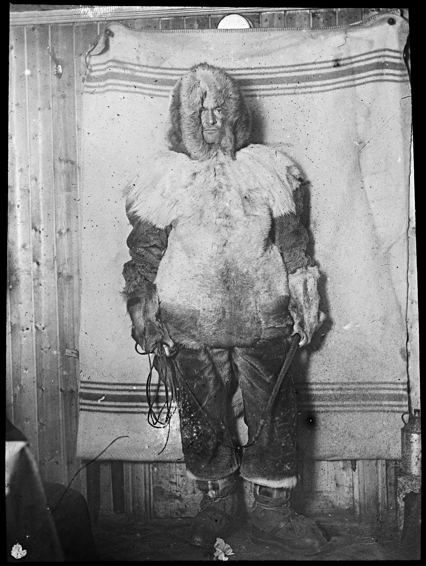 Tittel / Title: Portrett av Kristian Prestrud (1881-1927) Motiv / Motif: Positiv glassplate. Reinskinnsdraktene som ble brukt var ikke sydd etter mål, og enhver gjorde de forandringer han mente var nødvendig. Dato / Date: 1911 Fotograf / Photographer: ukjent / unknown Sted / Place: Antarktis, Hvalbukta, Framheim Eier / Owner Institution: Nasjonalbiblioteket / National Library of Norway Lenke / Link: Bildesignatur / Image Number: bldsa_NPRA0733